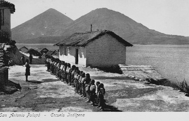 Escuela de San Antonio Palopó en 1900. Al fondo los volcanes Tolimán y Atitlán.